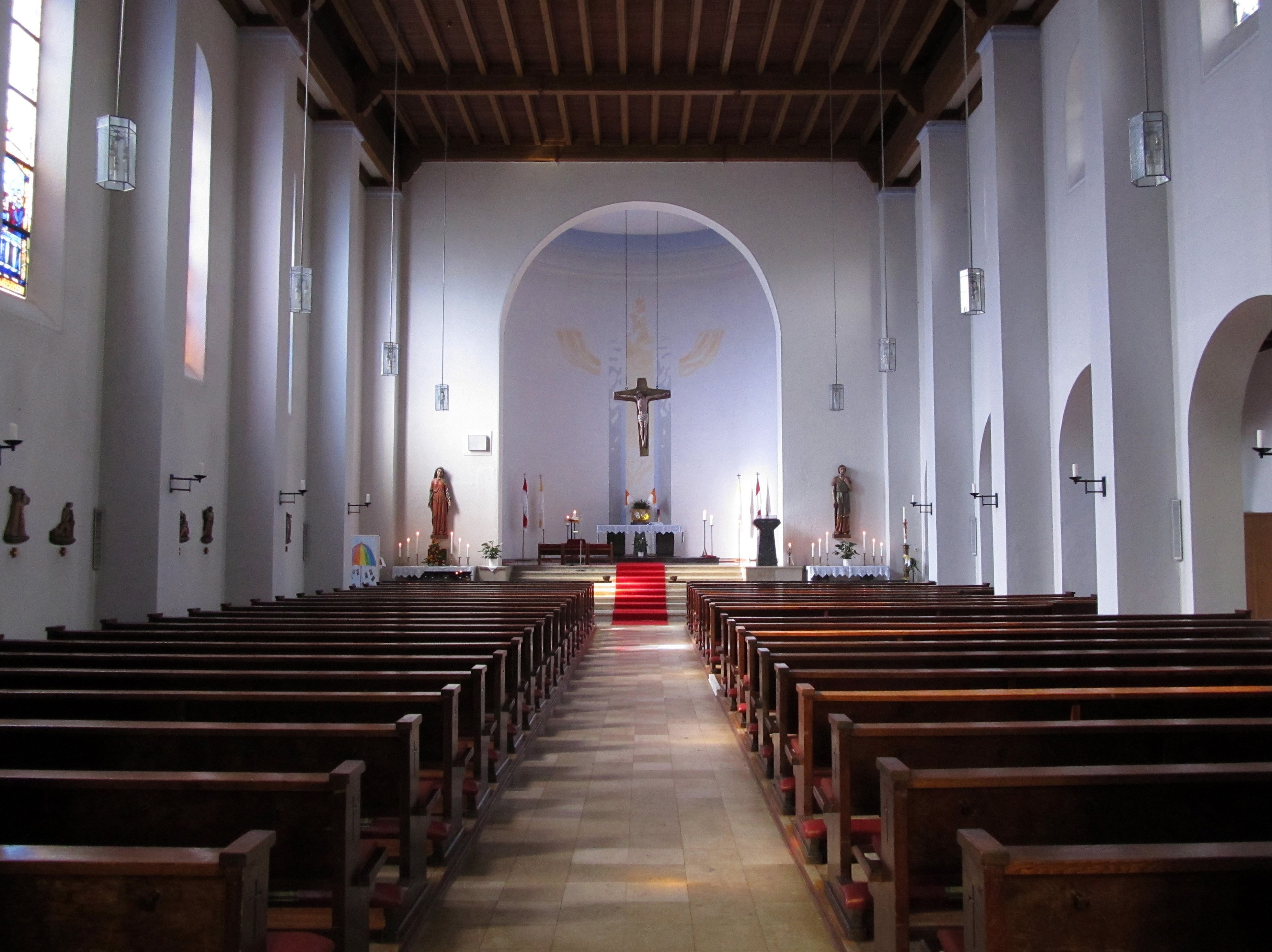 Blick ins Innere der katholischen Pfarrkirche Herz Jesu in Hassel, Saarland